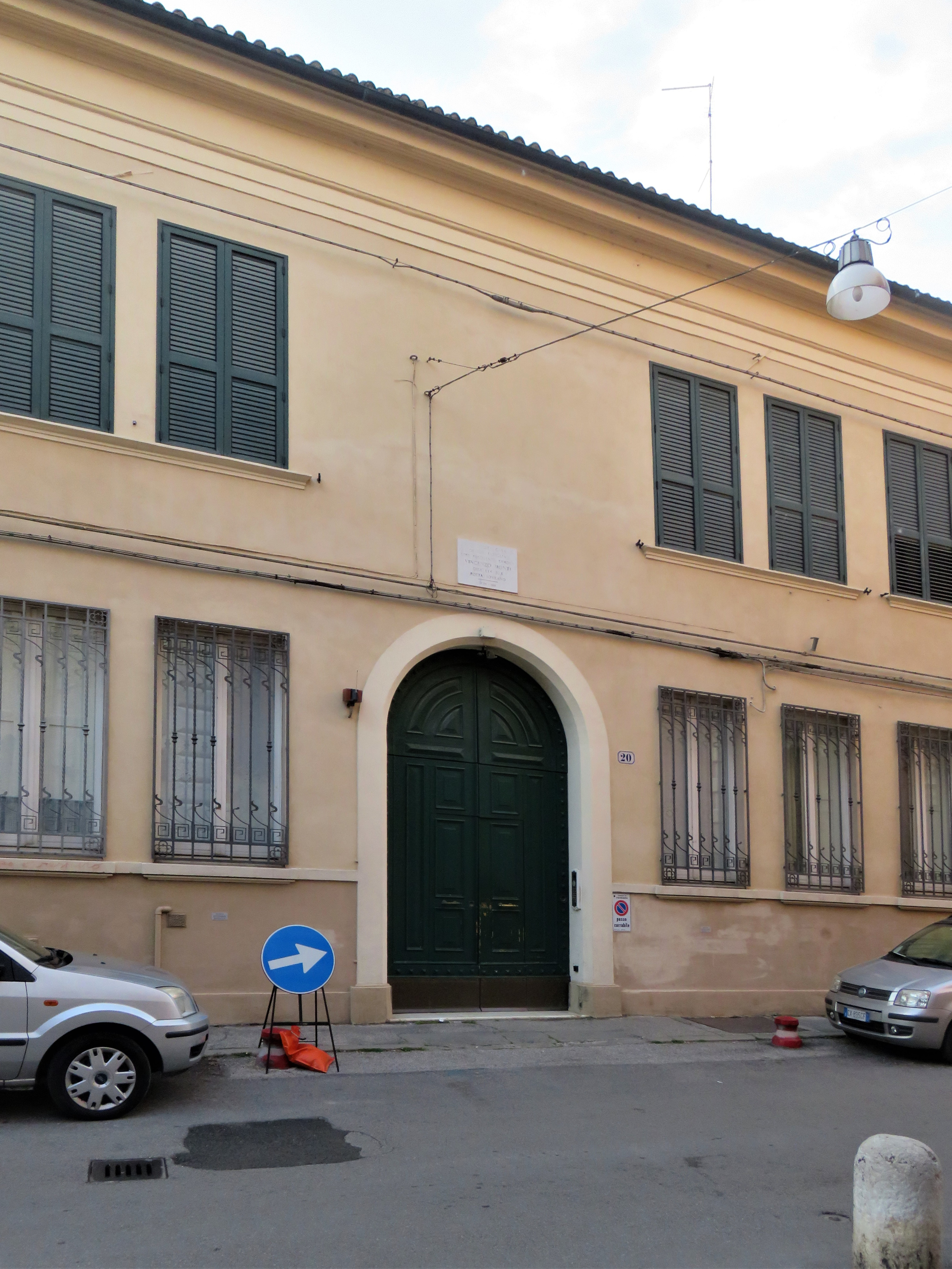 Via delle Scienze, casa poeta Vincenzo Monti. Testo della lapide marmorea sul portone: "IN QUESTA CASA DI SUA FAMIGLIA EBBE FREQUENTE DIMORA VINCENZO MONTI DELL'ETA' SUA POETA SOVRANO 1754 - 1828".